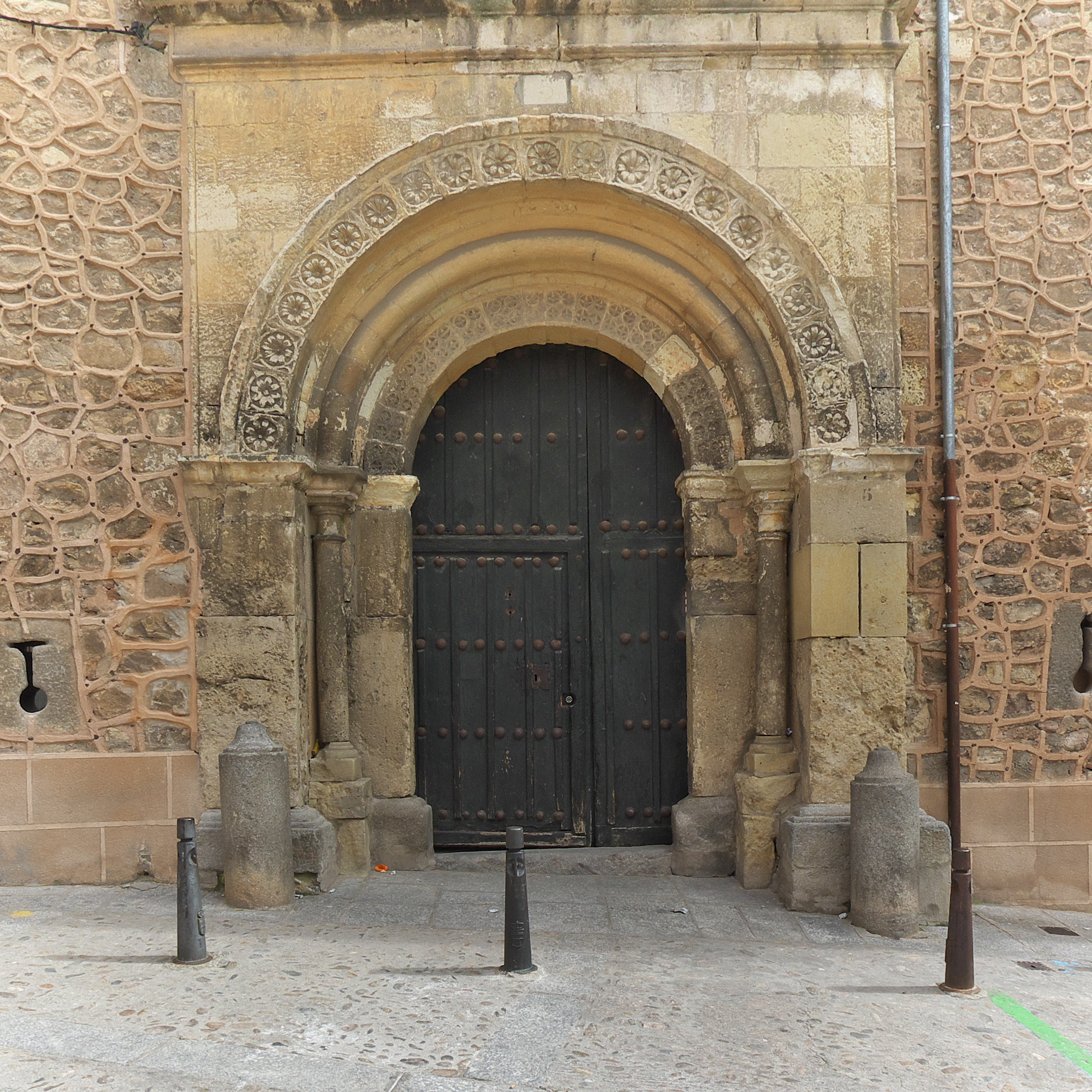 Portada románica en la arquitectura civil segoviana